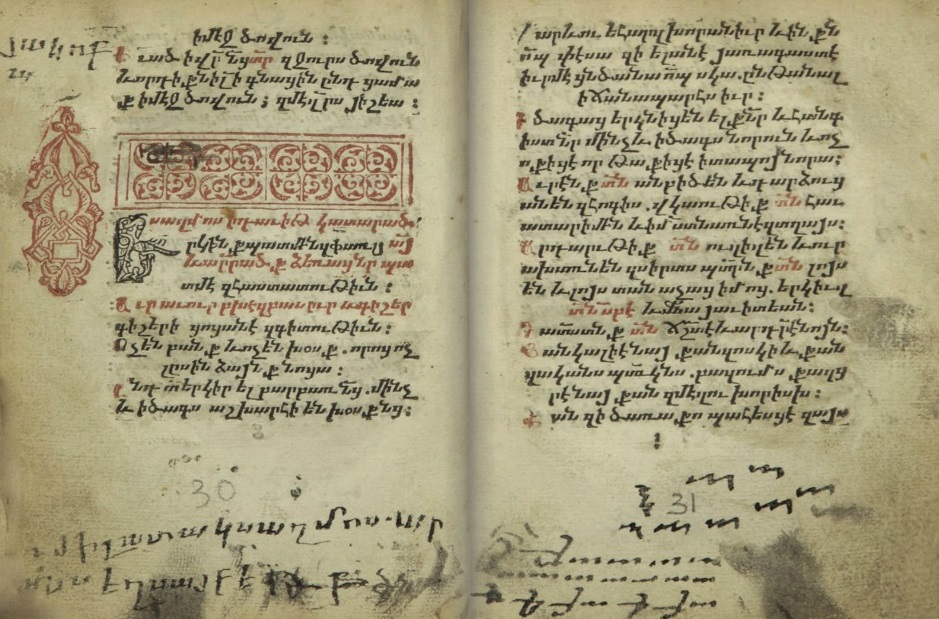 Армянский псалтырь, издание 1587 года.